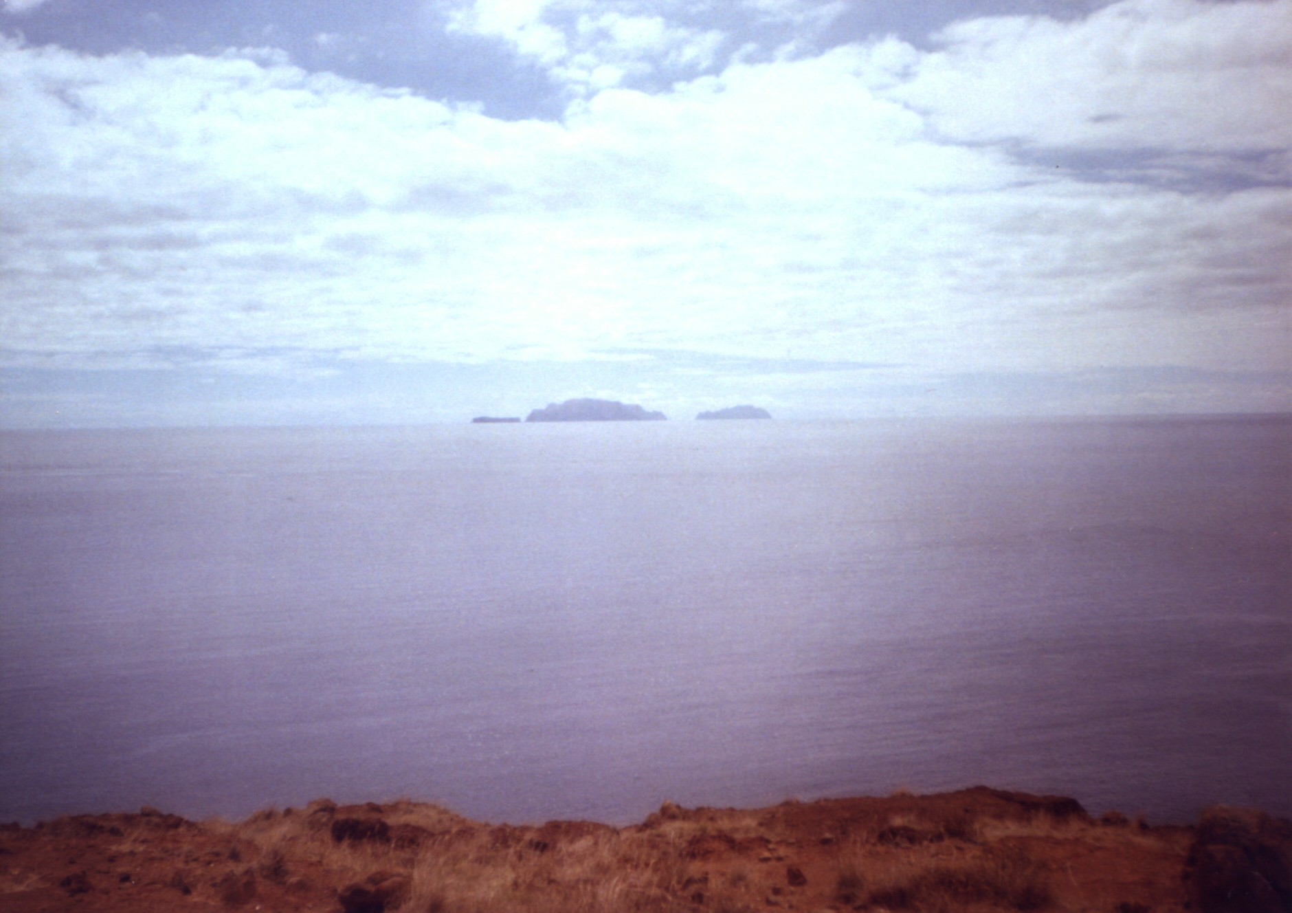 soupor jpg